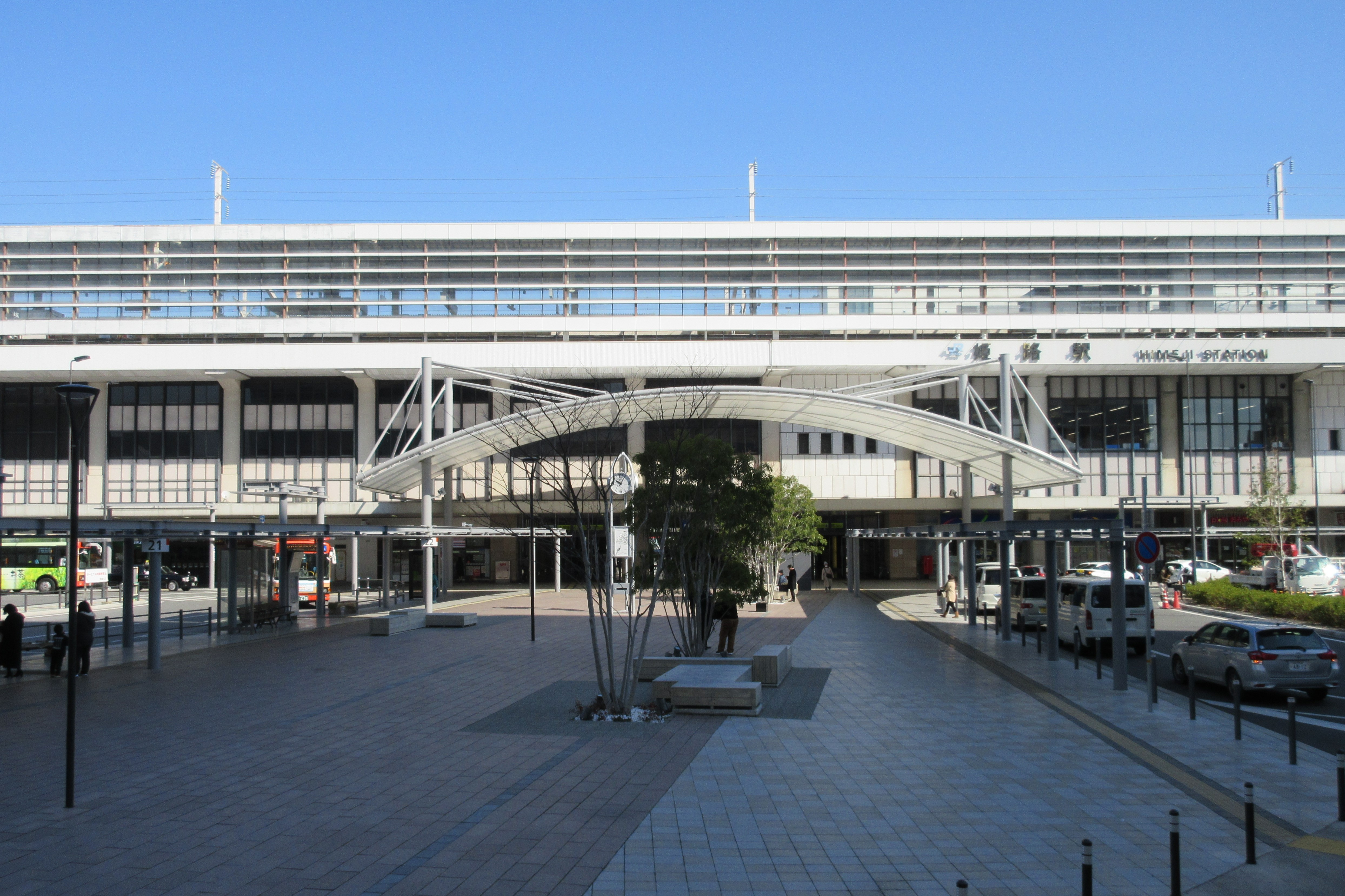 JR姫路駅南口